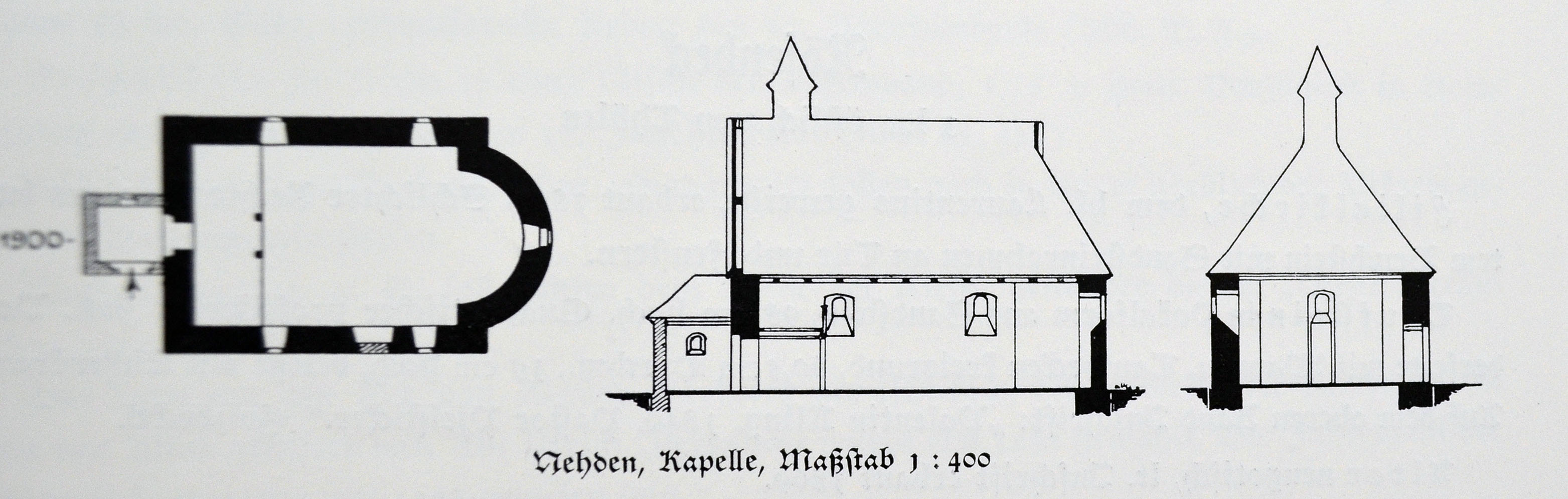 Grundriss der Kapelle in Nehden, Zeichnung ohne Schöpfungshöhe